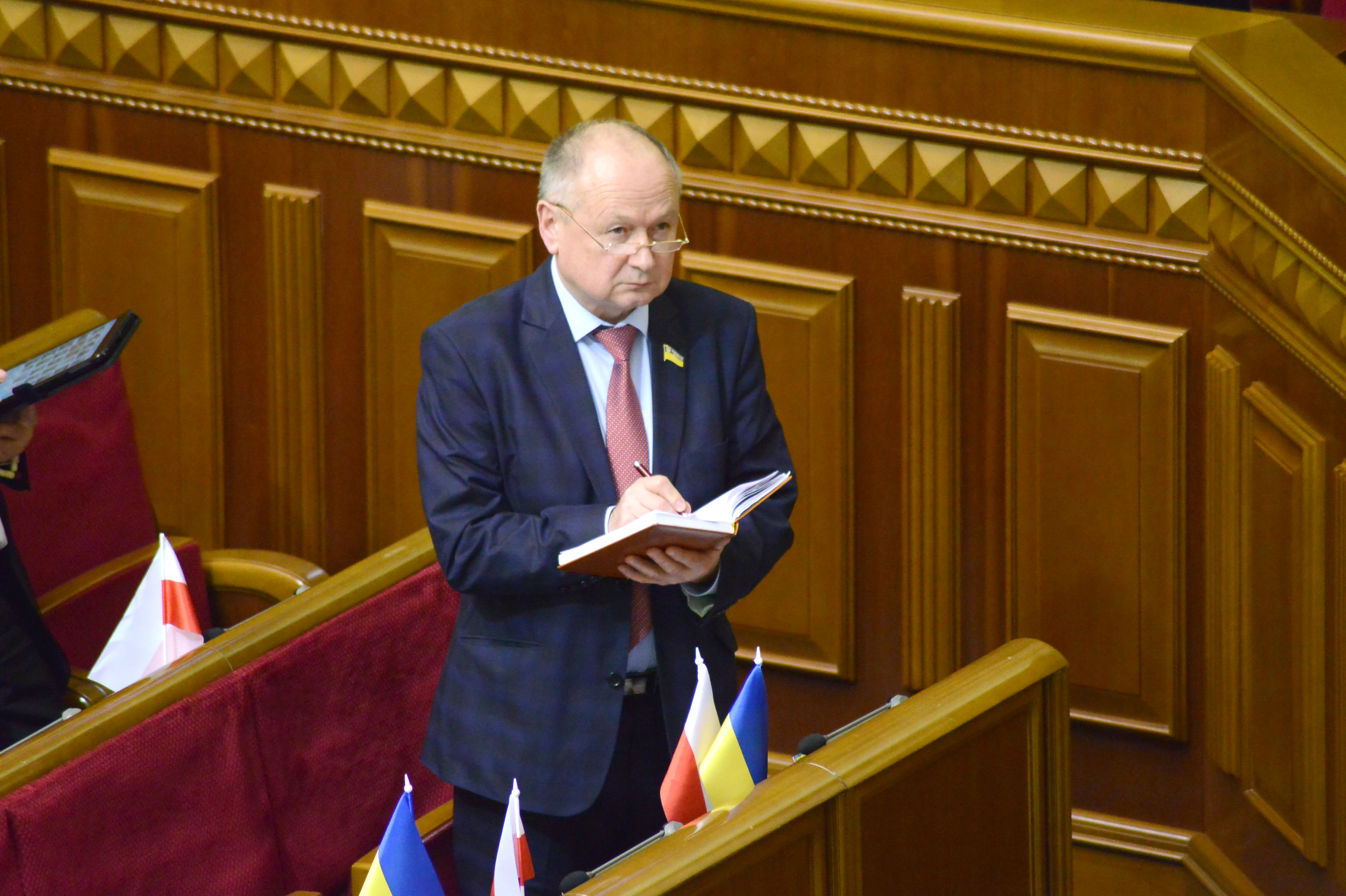 ВЕРХОВНА РАДА УКРАЇНИ 2015 фотограф Вадим Чуприна